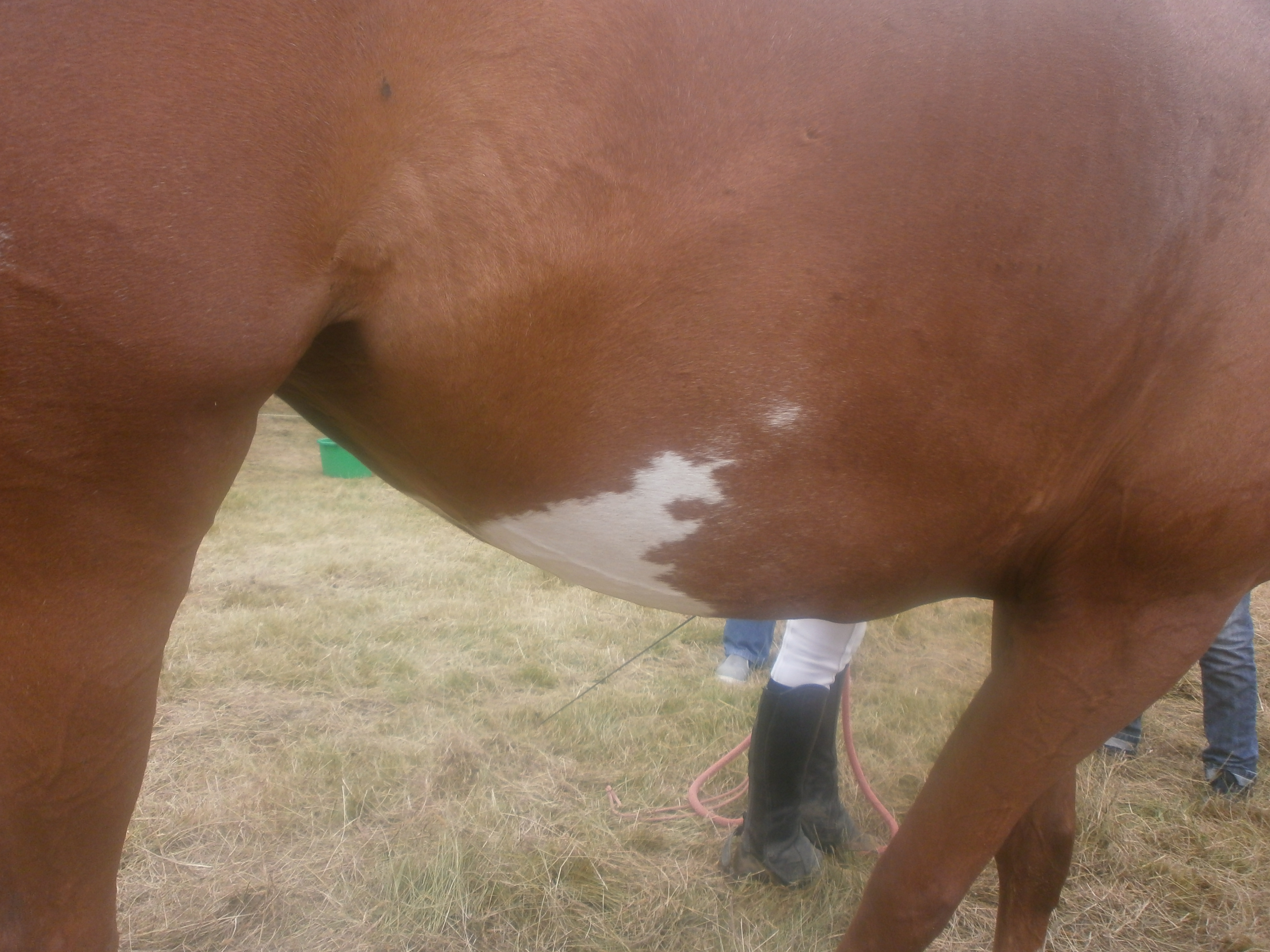 Tache du gène splashed white sur une jument trotteur à la fête du cheval de Saint-Guyomard, 3 juillet 2016